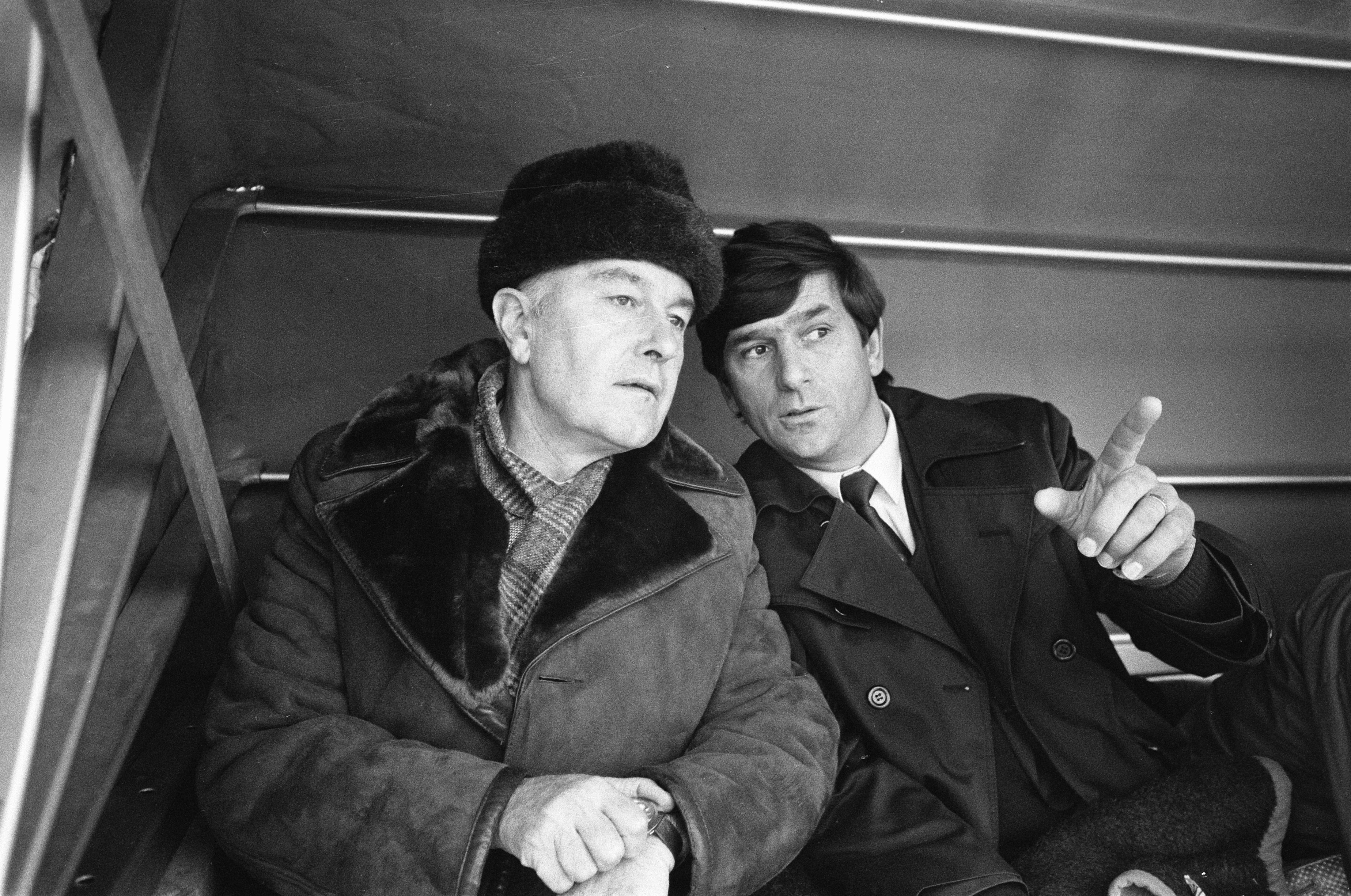 Feyenoord-trainer Jezek zat tijdens wedstrijd Feyenoord tegen Ajax weer in de dug-out, Jezek (links) met naast hem hulptrainer Westerhof. Datum: 8 december 1980